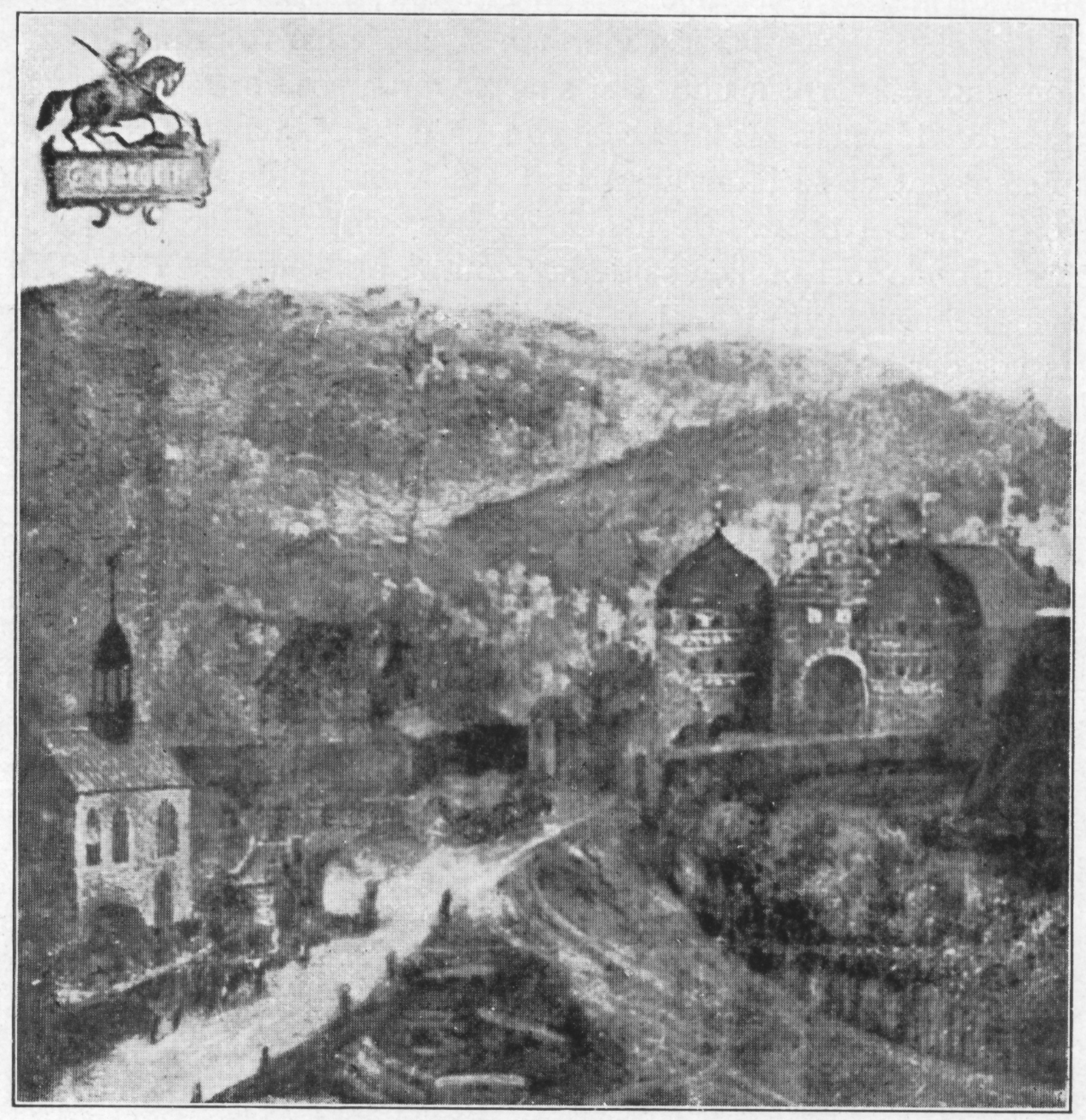 Die alte St.-Jürgen-Kapelle in Lübeck (am linken Bildrand). Erbaut 1290, abgerissen 1629